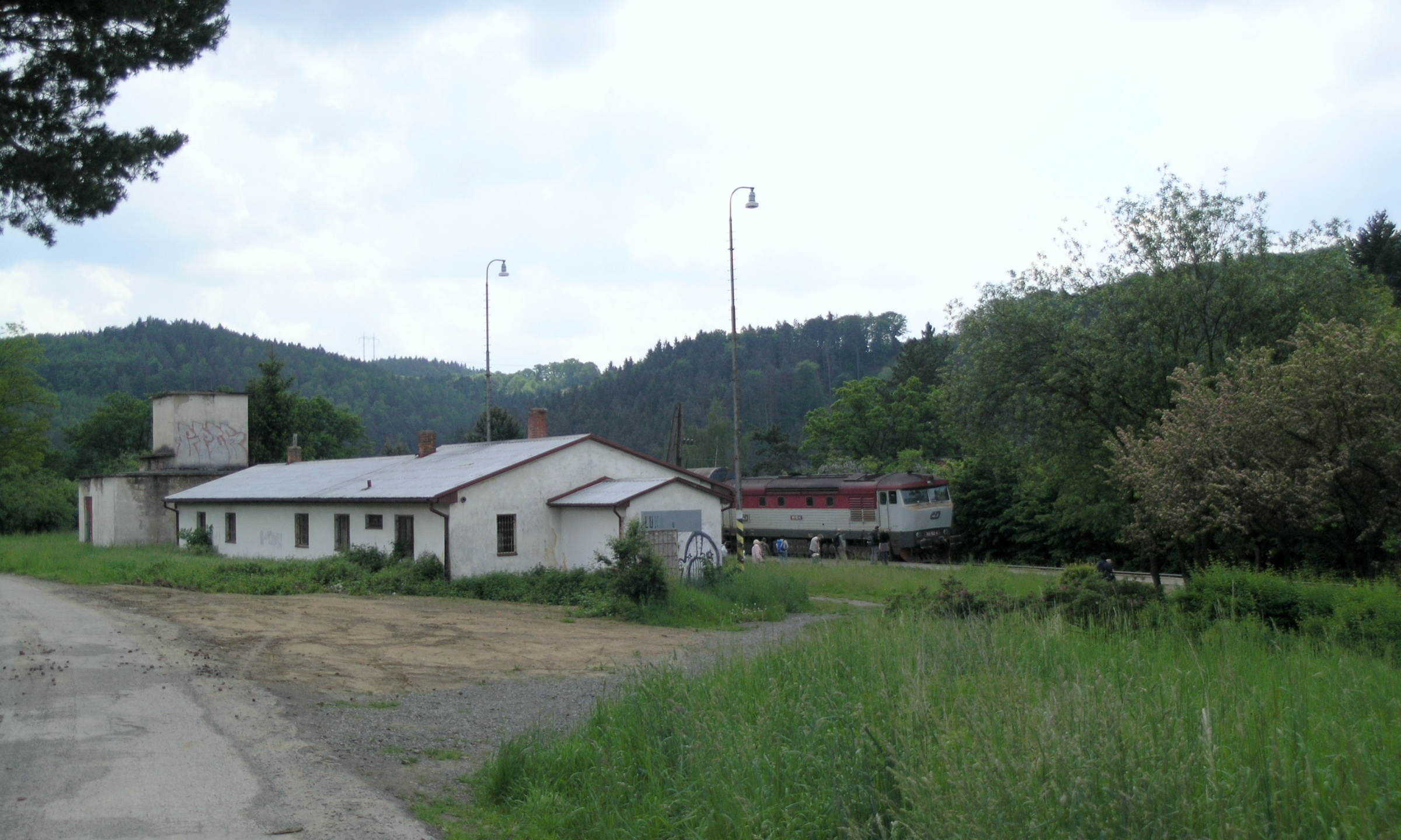 Luka pod Medníkem - železniční zastávka